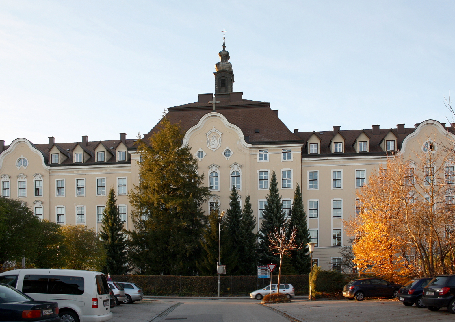 Das Mutterhaus der Franziskanerinnen in der oberösterreichischen Stadt Vöcklabruck.